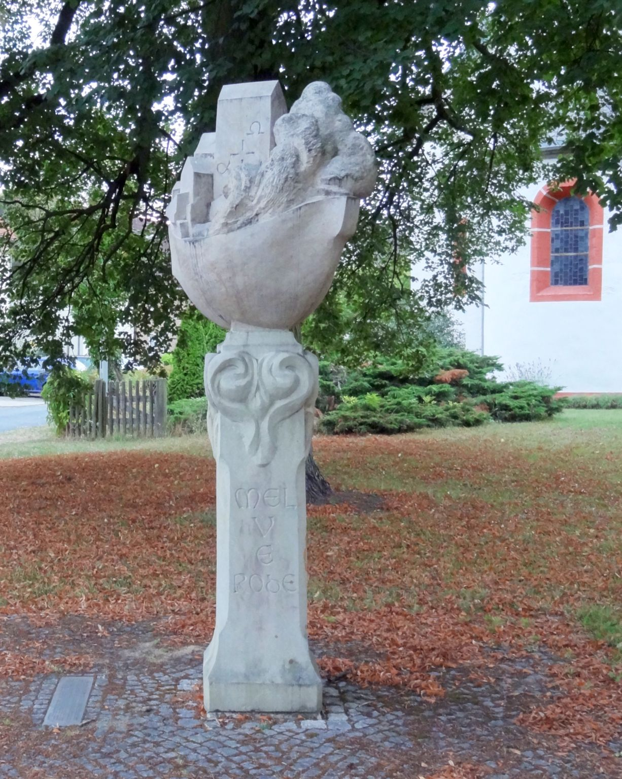 Jubiläumsstele vor der Nicolaikirche in Braunschweig-Melverode